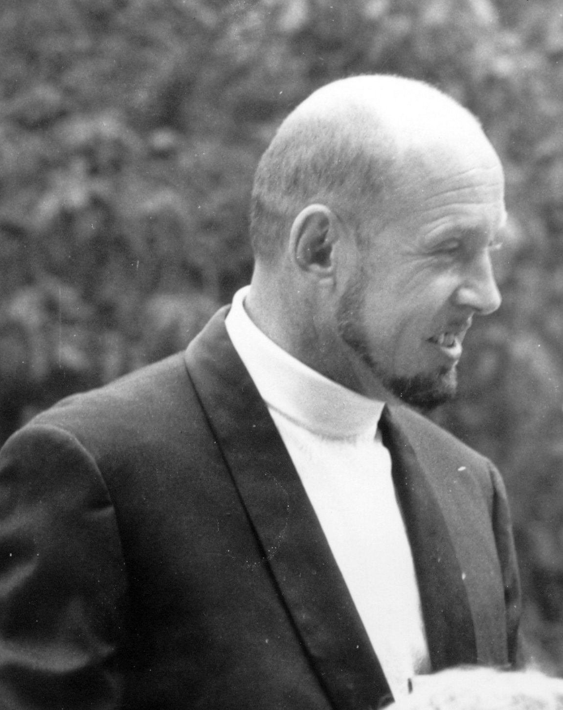 René Delayre, mai 1969